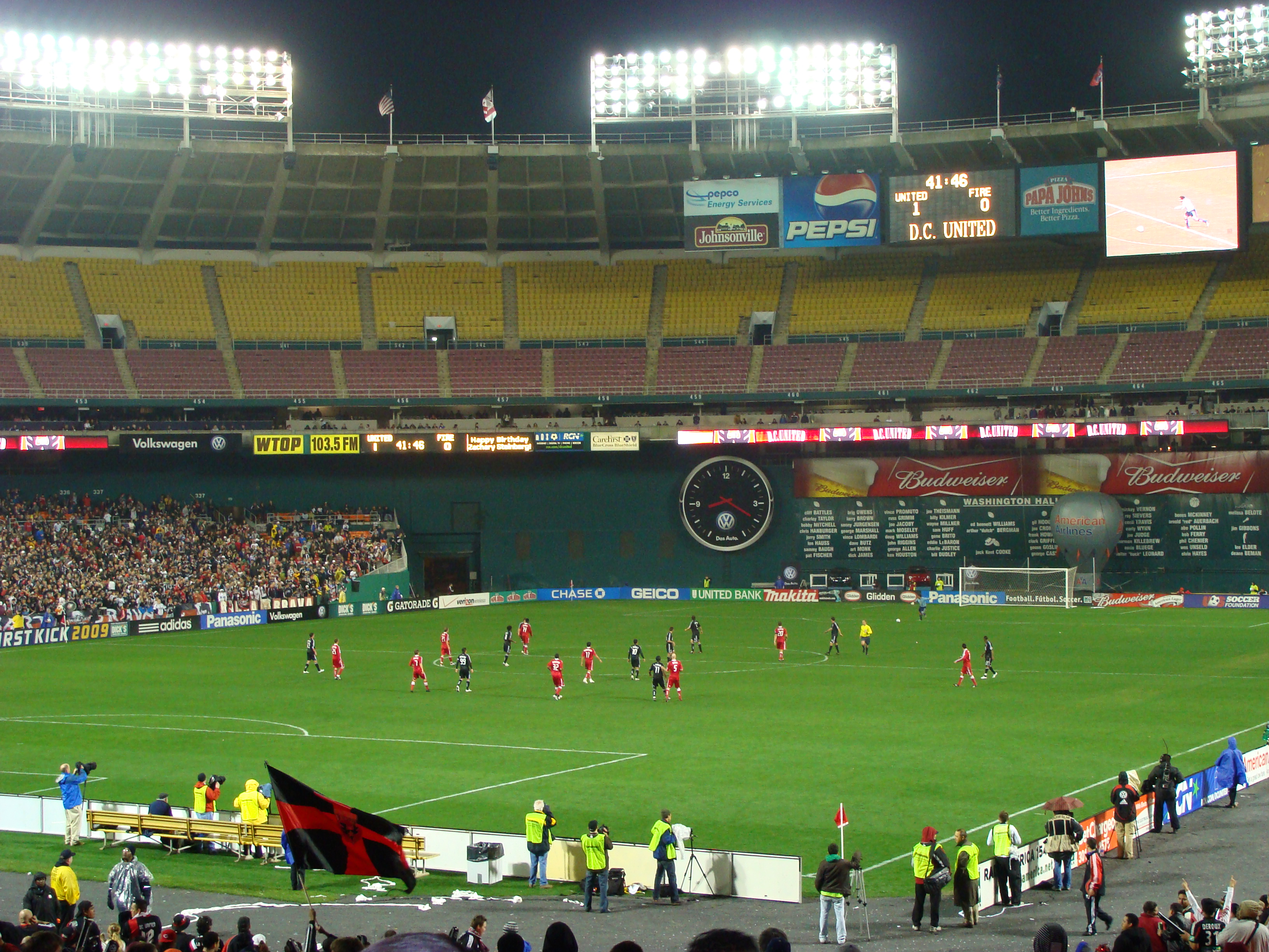 Vereinigte Staaten: MLS-Spiel von DC United gegen Chicago Fire im RFK Memorial Stadium in Washington DC